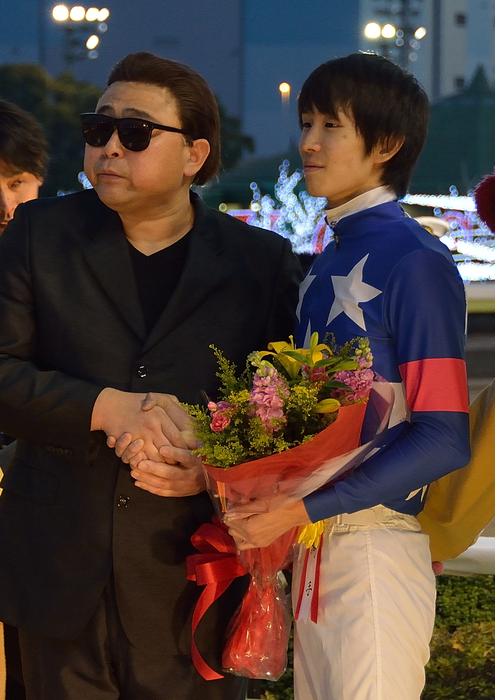 2015年12月31日に大井競馬場の第10競走で行われた「第39回東京2歳優駿牝馬」の表彰式で、勝利馬のモダンウーマンに騎乗した阿部龍騎手（右側）と、プレゼンターのコージー冨田（左側）を、観客席から撮影したもの。